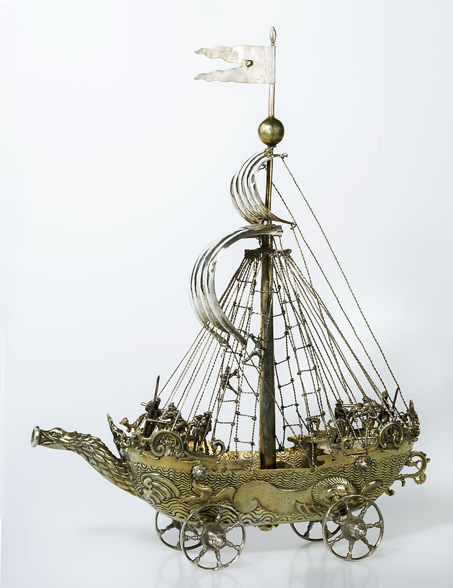 Georg Müllner: Trinkschiff auf Rädern (Trinkspielautomat), um 1645, Nürnberg.Museum für Kunst und Gewerbe Hamburg (MKG).